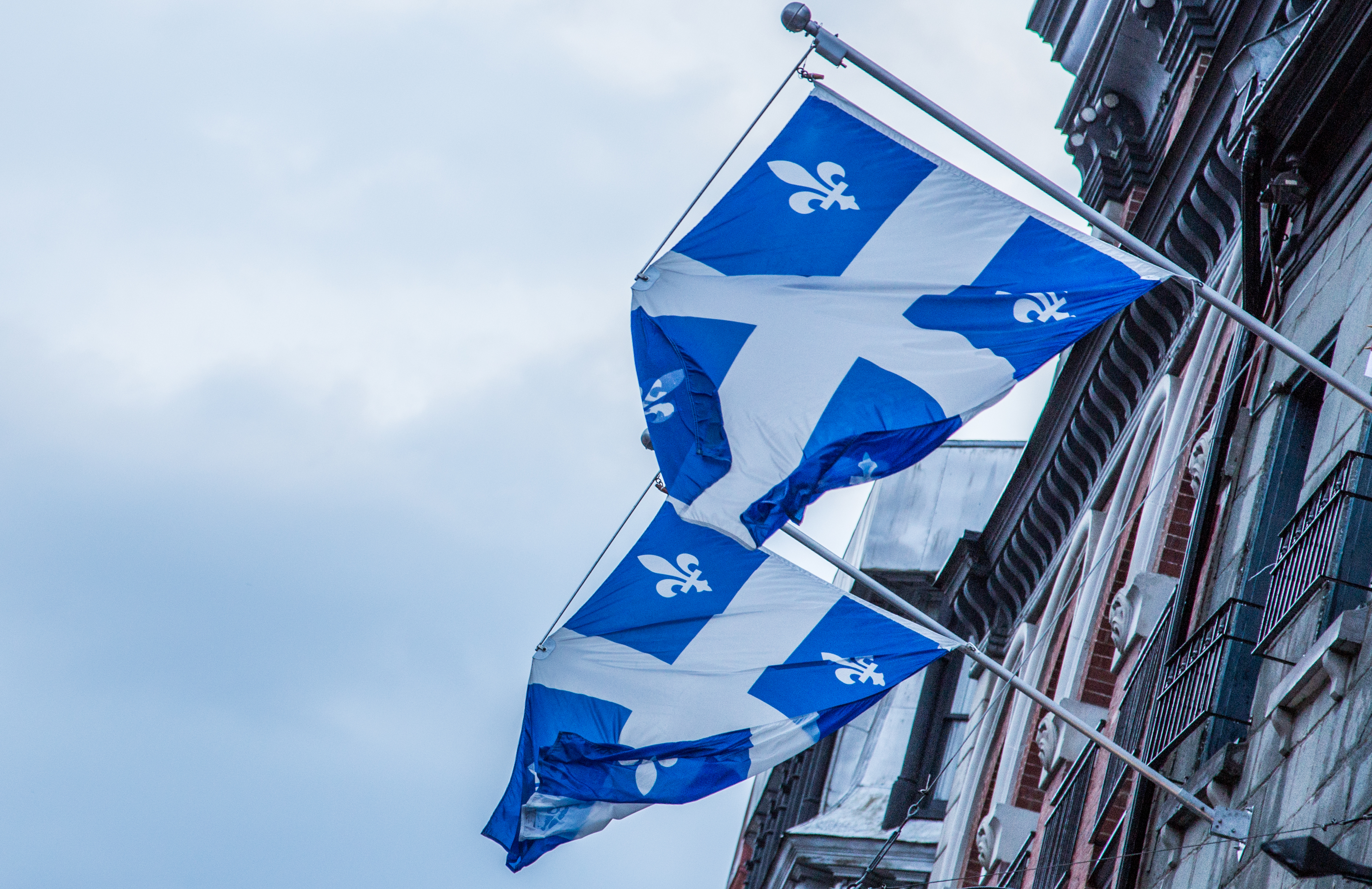 Québec Flag